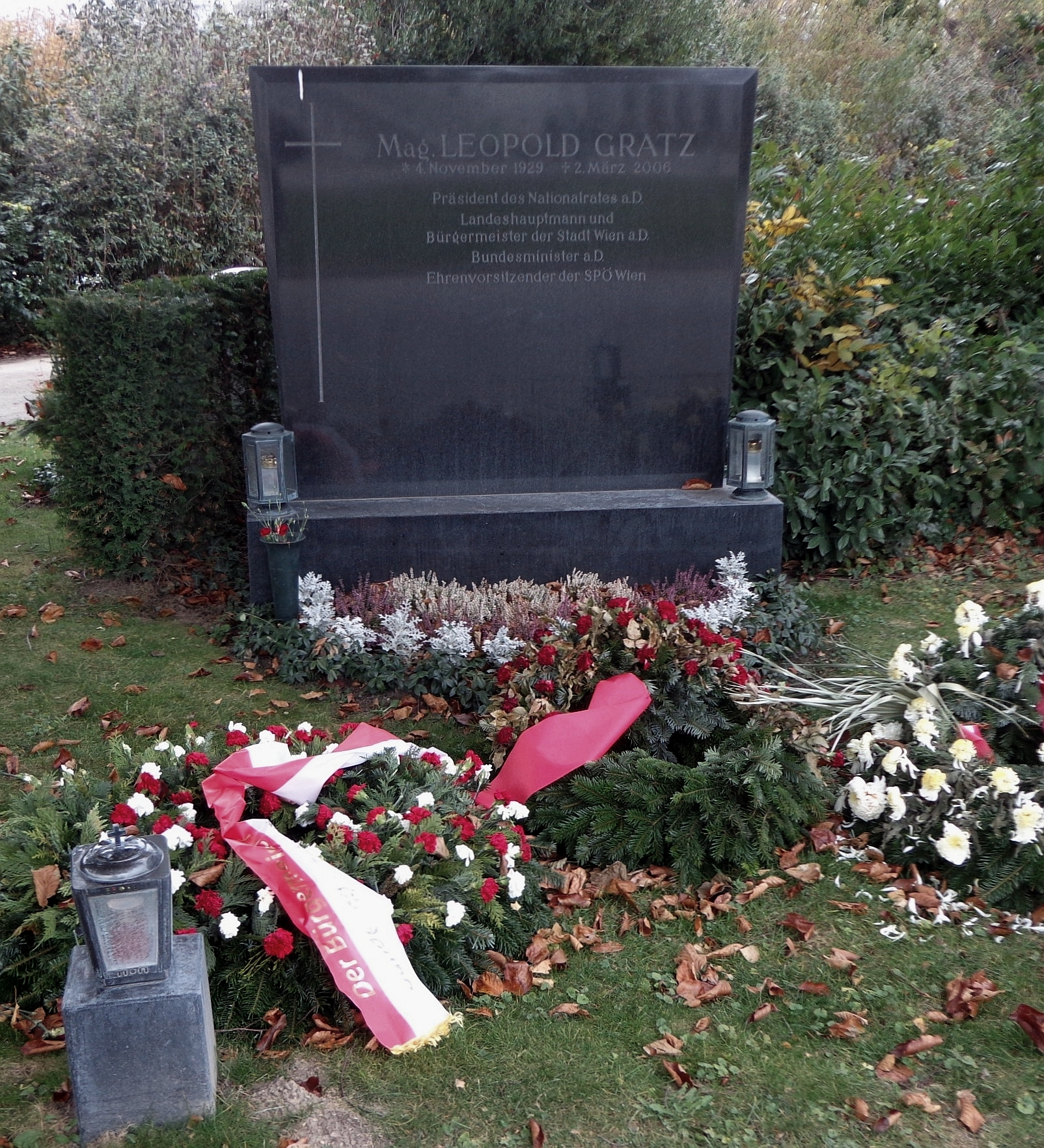 Wiener Zentralfriedhof - Gruppe 14 C, Ehrengrab von Leopold Gratz